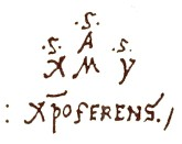 Un des deux véritables sigles utilisés par Colomb qui ressemble plus à un code complexe qu'à une simple signature.